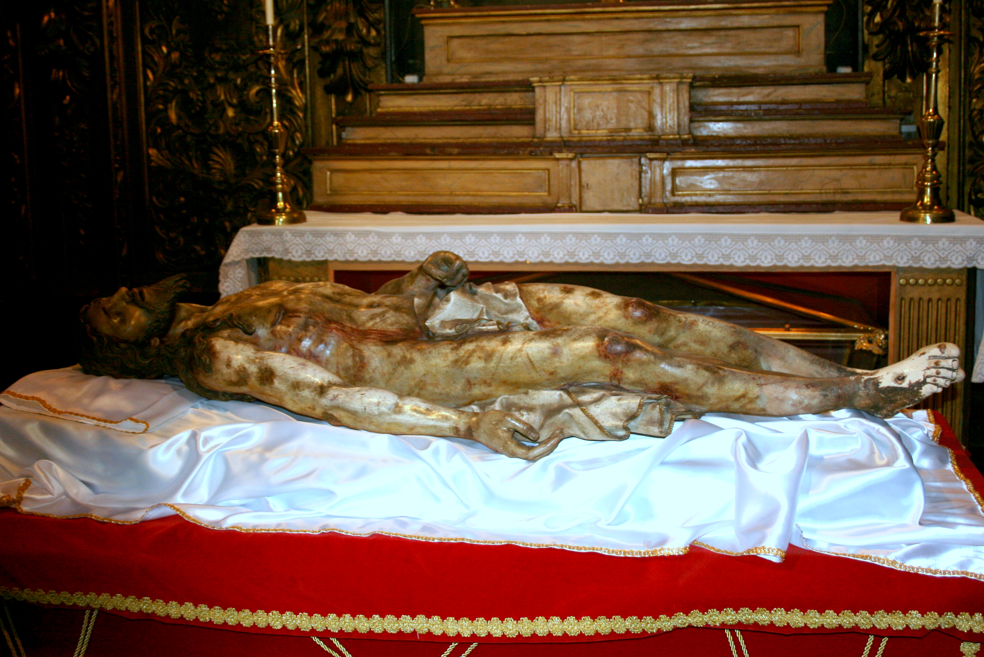 Juan Sánchez Barba, Cristo yacente, iglesia del Carmen Calzado.